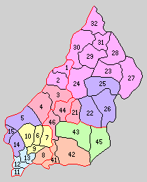 後の大阪府北河内郡域の町村制時点の町村。